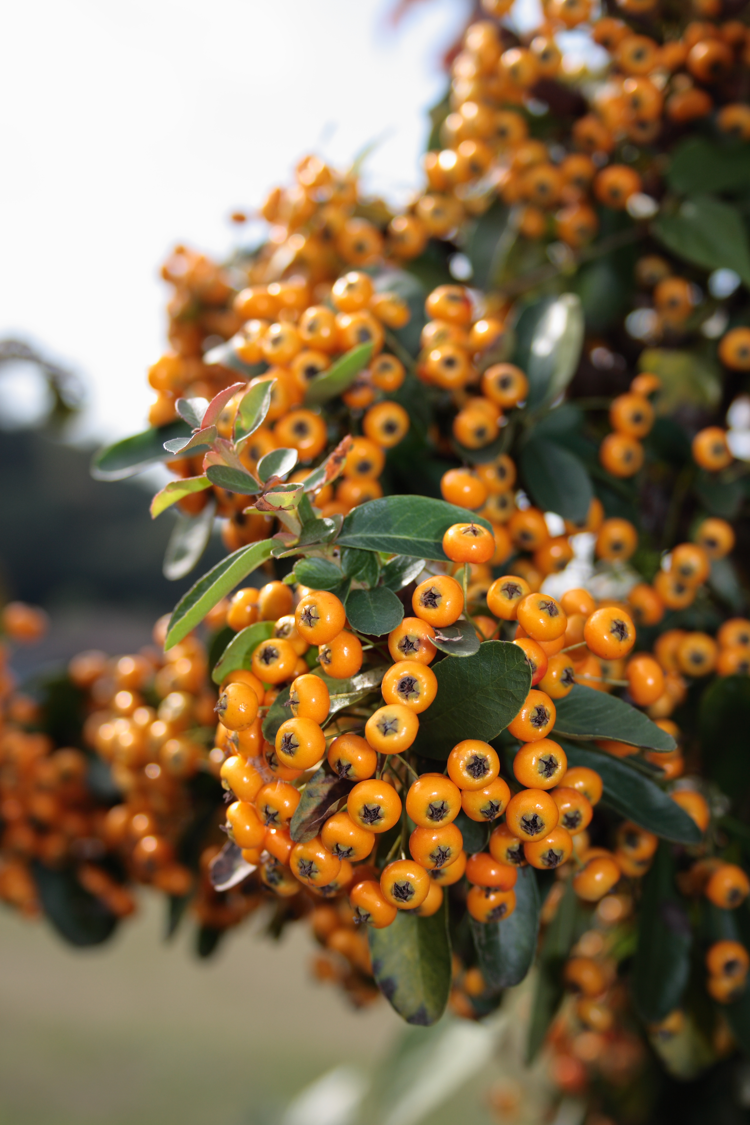 タチバナモドキ (学名:Pyracantha angustifolia)